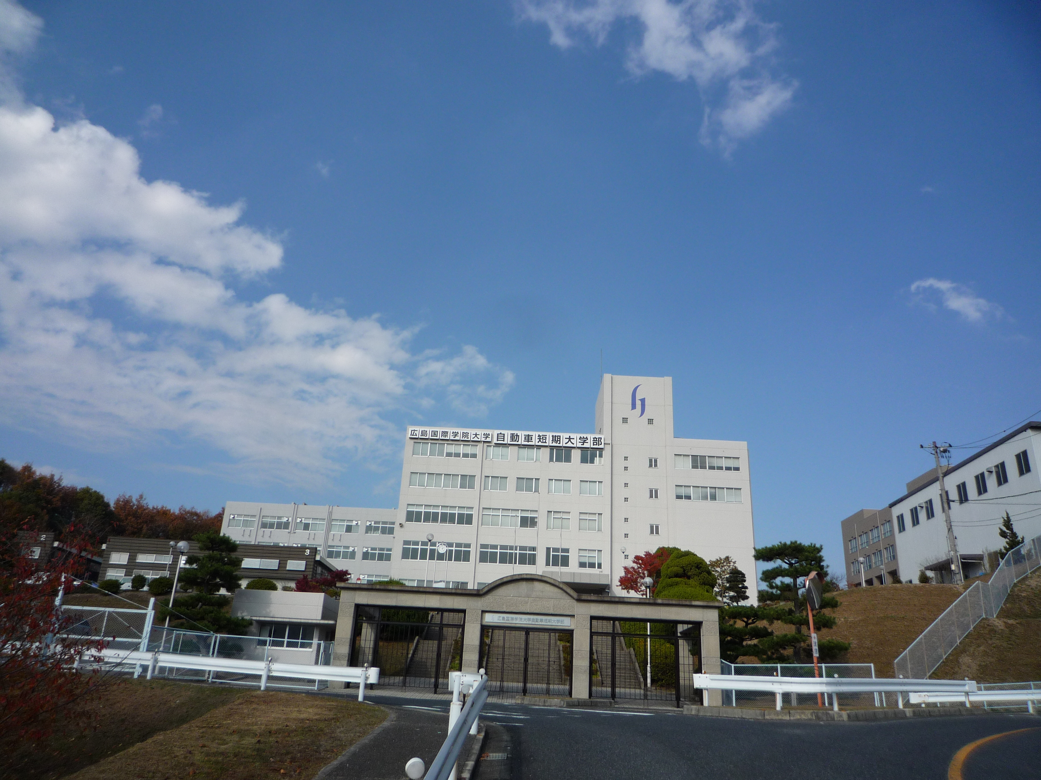 広島国際学院大学自動車短期大学部